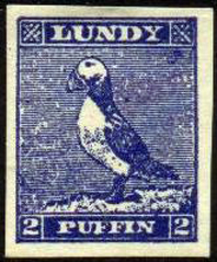 A cinderella stamp of Lundy (a virtual state). Puffin (Fratercula arctica)